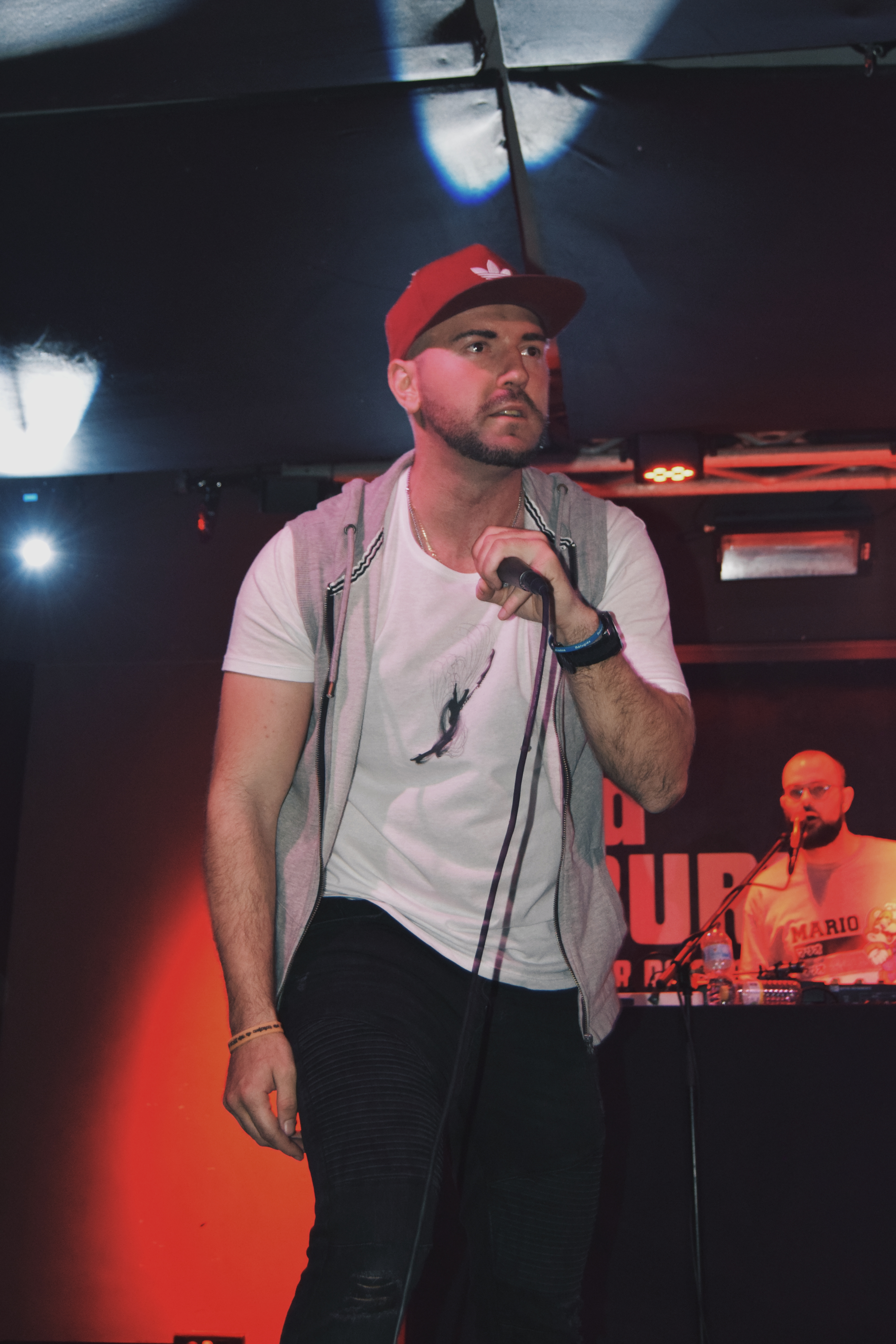 Alfons Pérez "el Blüe" en concert a la Sala La Burbuja de Castelló de la Plana amb Malparlat.